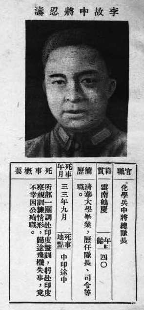 中文（台灣）: 抗戰軍人忠烈錄第一輯中的烈士遺像